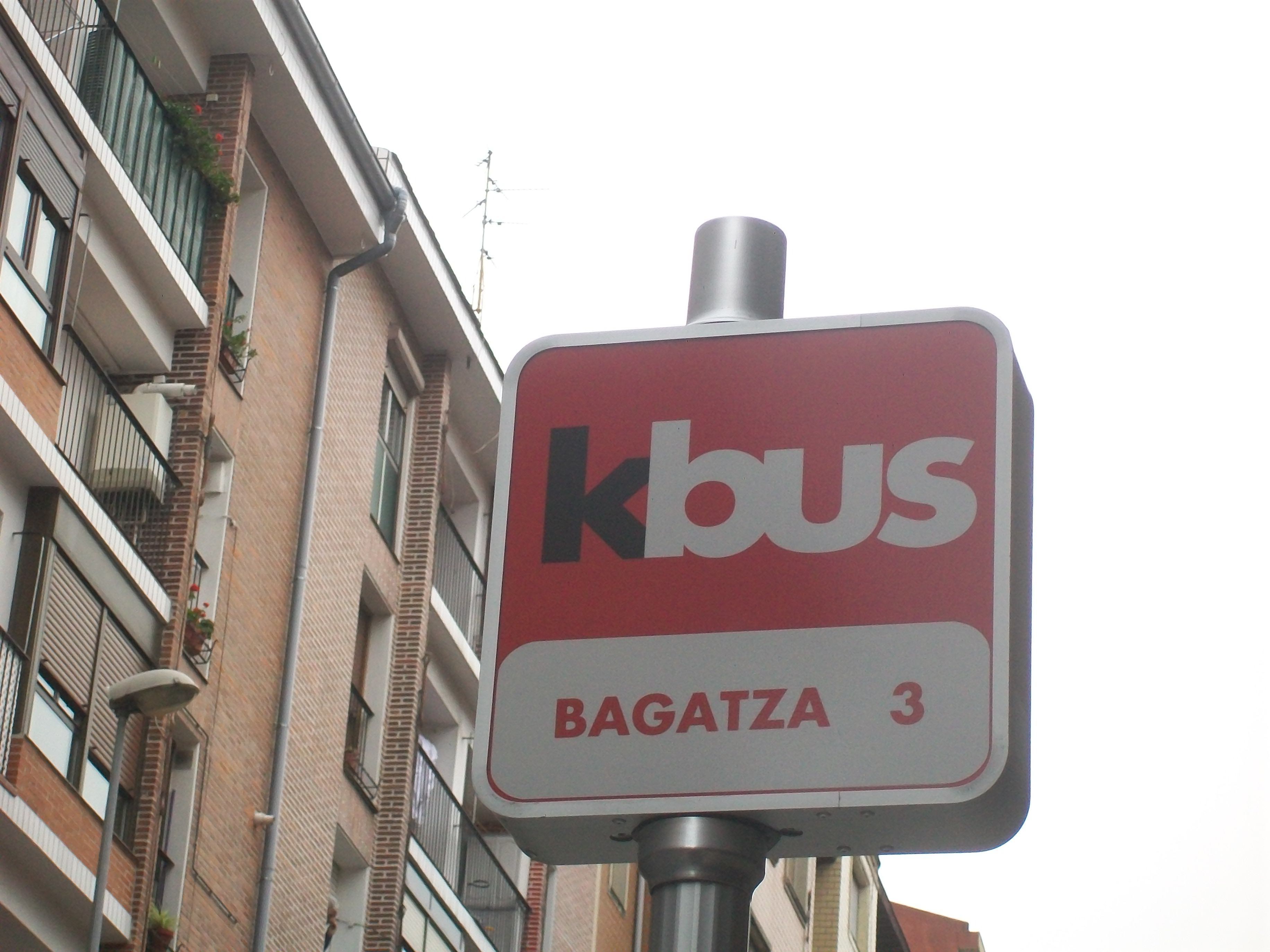 Señal del Kbus (parada Bagatza 3)